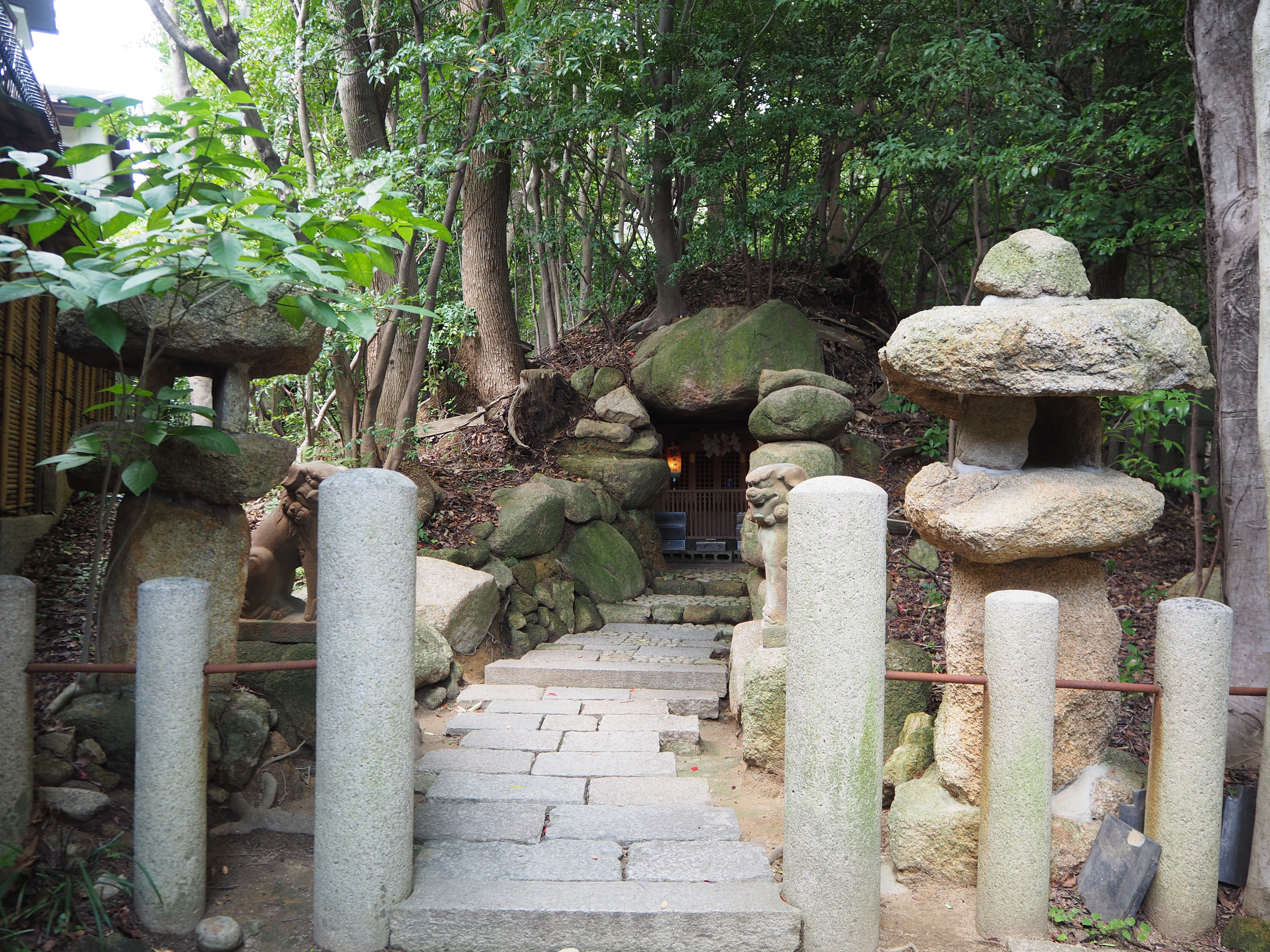 芦屋神社境内古墳墳丘及び横穴式石室の羨門と羨道